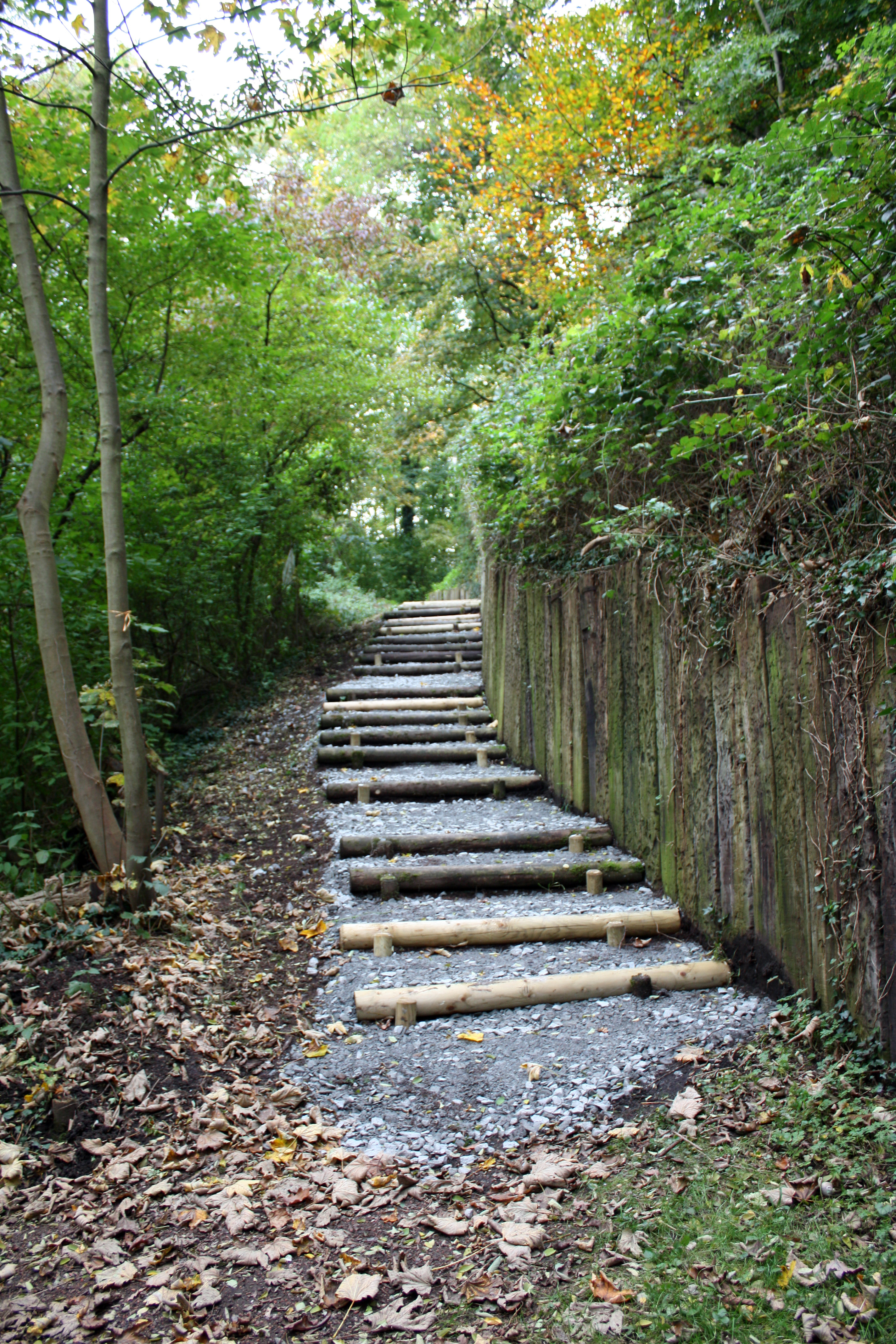 Hürth, Adolf-Dasbach-Weiher Ostseite